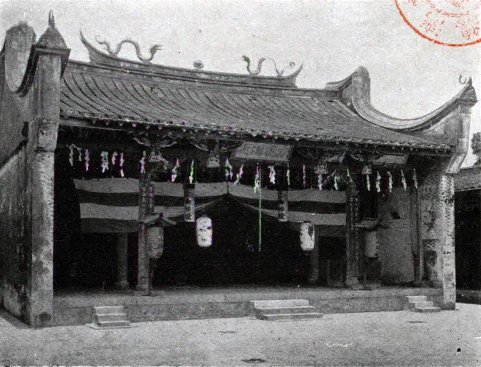 中文（台灣）: 開山神社惟祭祀鄭成功的神社，神社建築最初沿用延平郡王祠的閩南式宮廟建築。